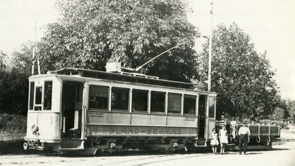 Ce 2/2 Nr. 1 der Chemin de fer électrique Gland–Begnins. Die Bahn besass nur zwei Triebwagen, ein Anhänger und drei Güterwagen. Die beiden 1906 gelieferte Triebwagen stammten von MAN, Augsburg und Rieter, Winterthur. Sie wurden nachdem die Bahn eingestellt worden war 1954 abebrochen.